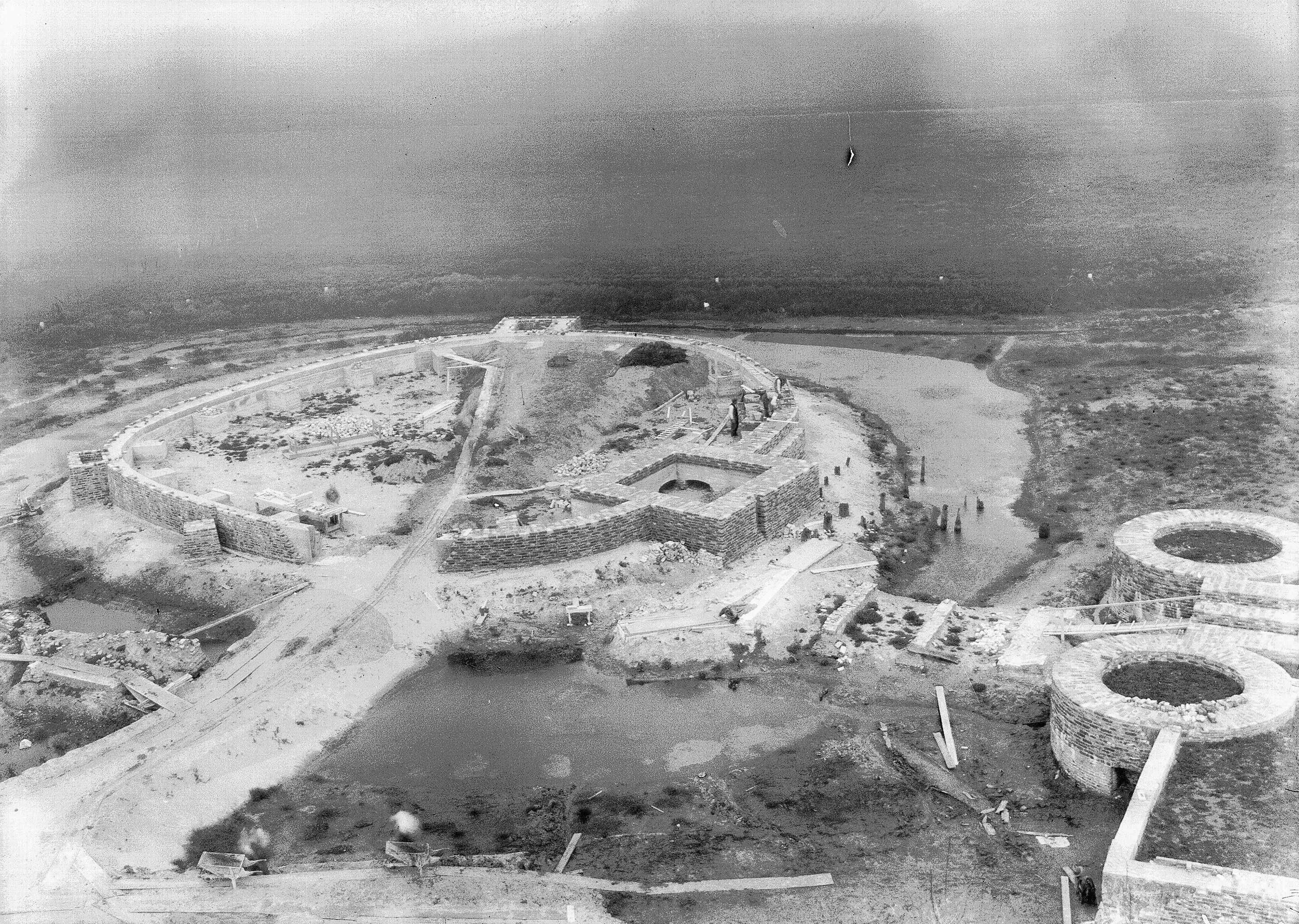 Kasteel: ruïne